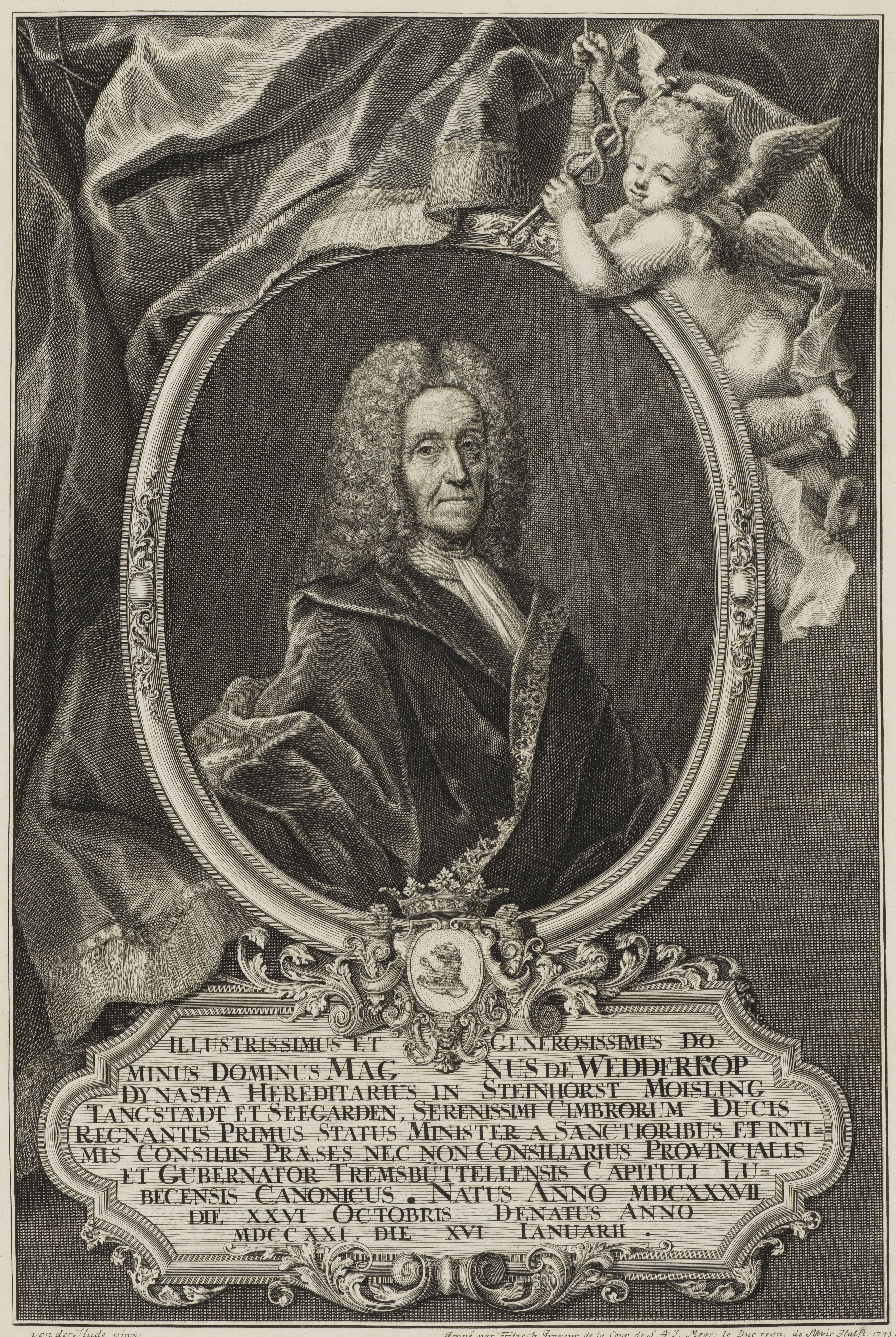 Bildnis von Magnus von Wedderkopp